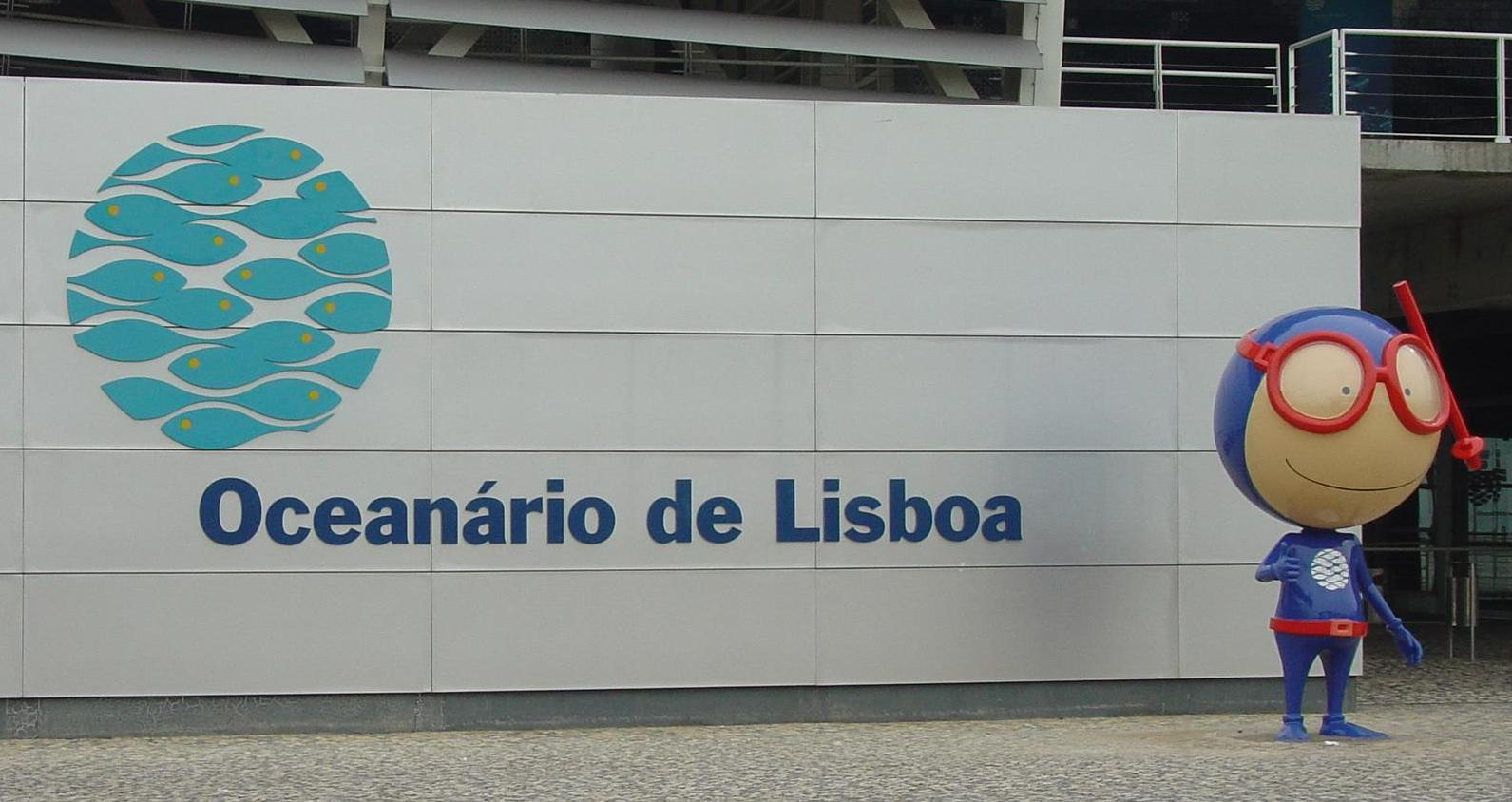 mascote do oceanário de Lisboa